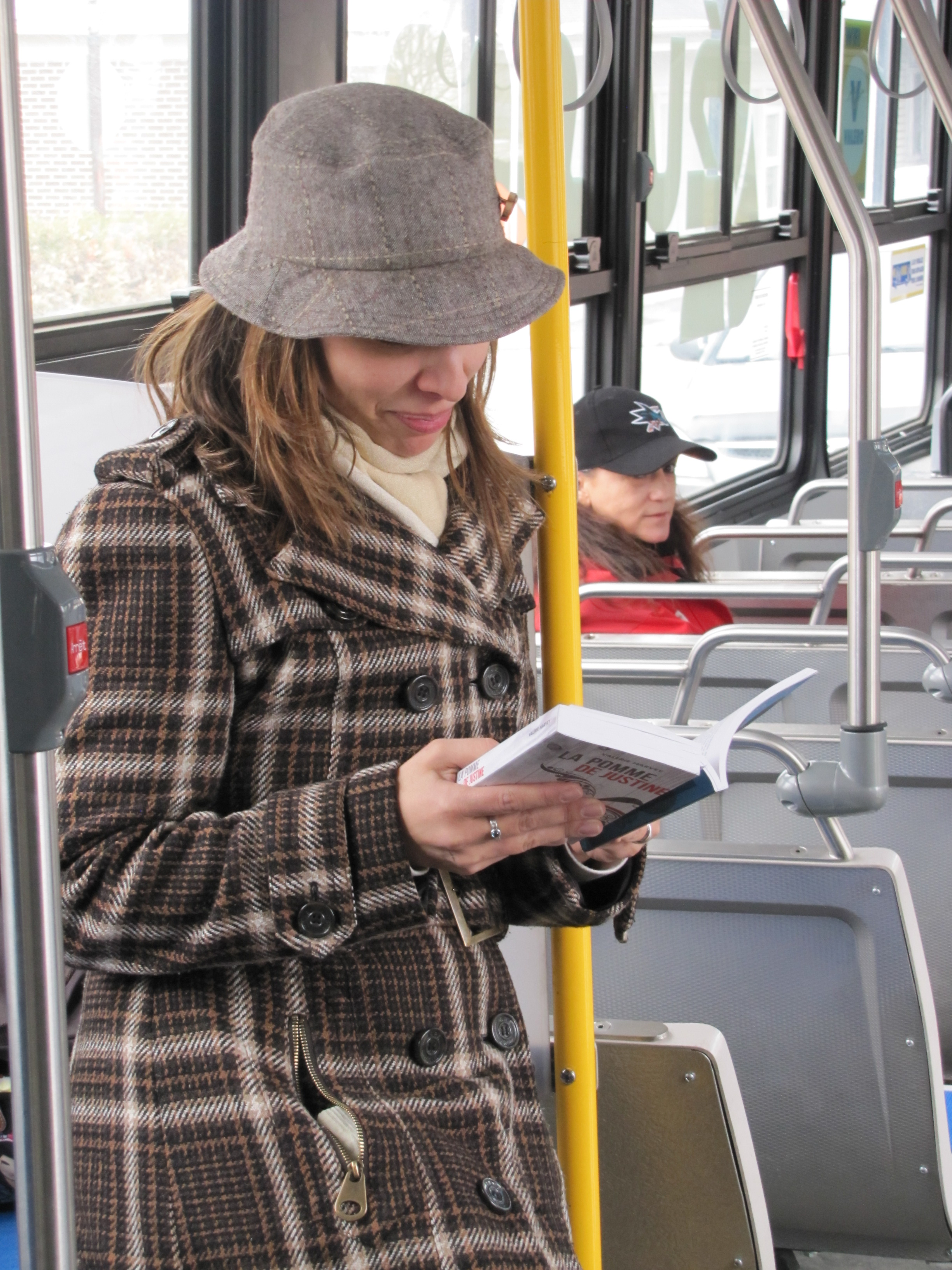 L'auteure québécoise Valérie Harvey donne lecture d'un extrait d'un de ses ouvrages à bord d'un autobus de la Société de transport de Lévis à l'occasion de la Journée mondiale du livre et du droit d'auteur 2015.